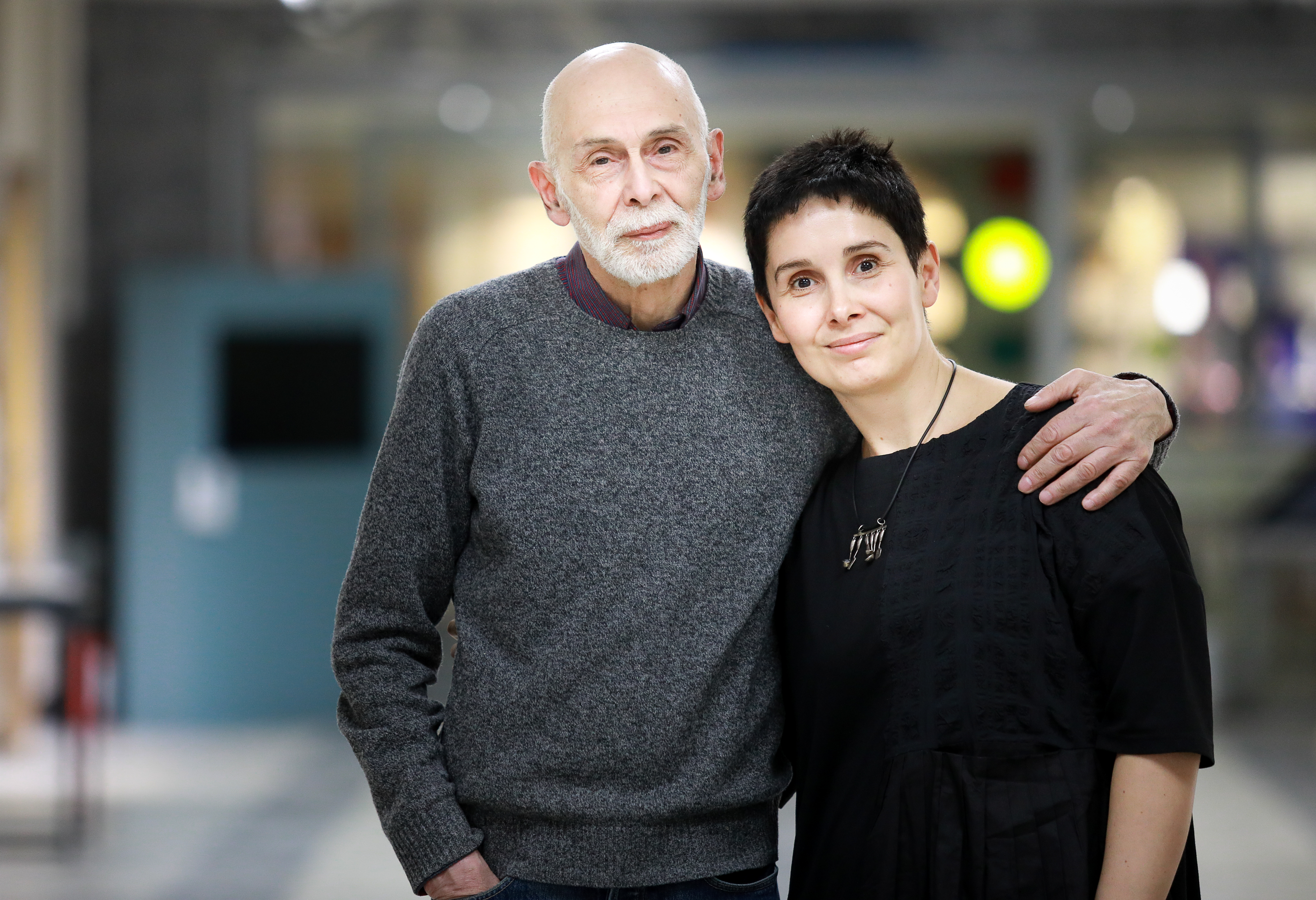 Леонид Юзефович с дочерью Галиной Юзефович в Российской государственной детской библиотеке на лектории "Fabula rasa".